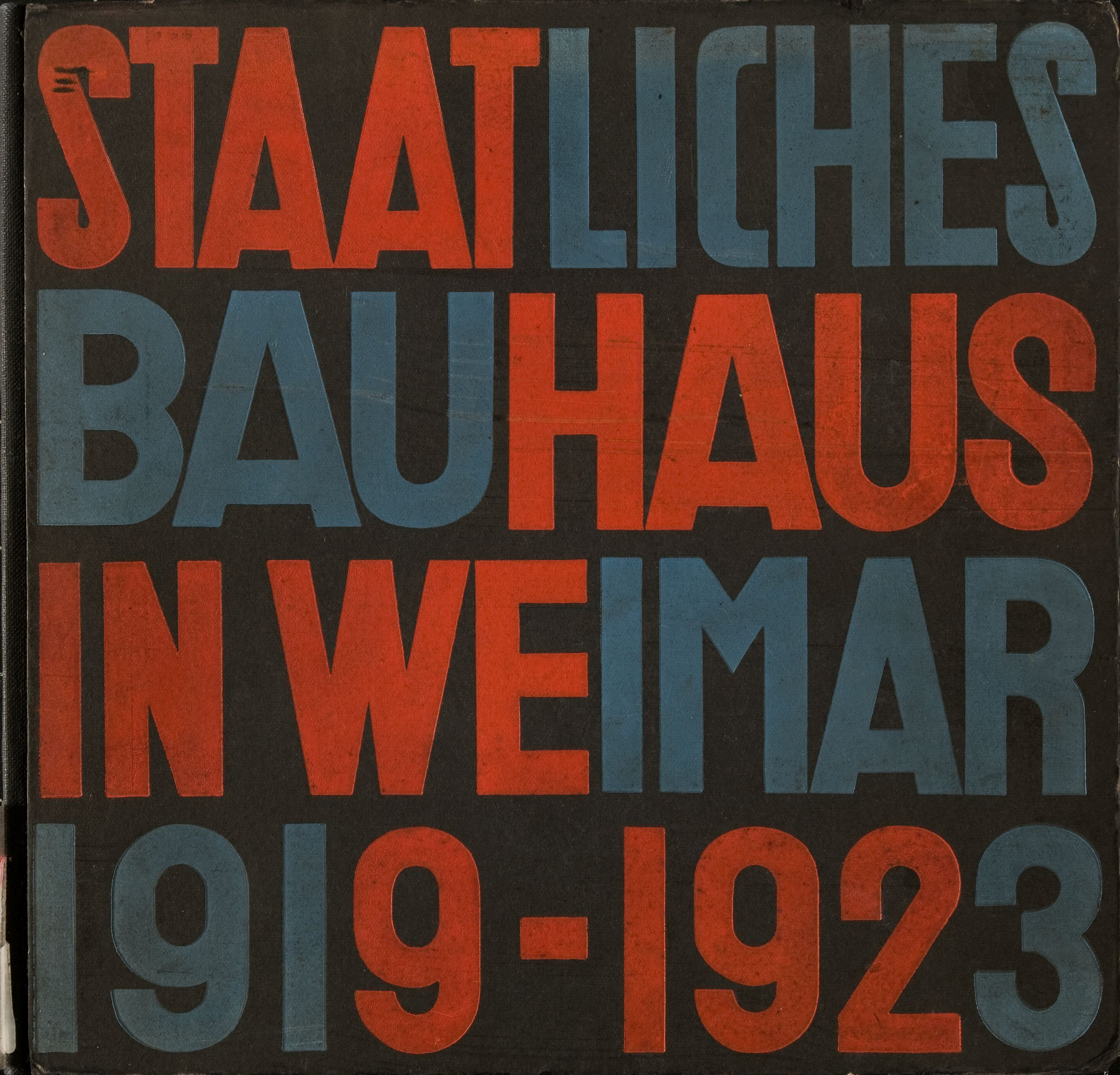 Staatliches Bauhaus in Weimar 1919-1923 (1923), Vorderdeckel (Entwurf von Herbert Bayer), Foto: Tobias Adam